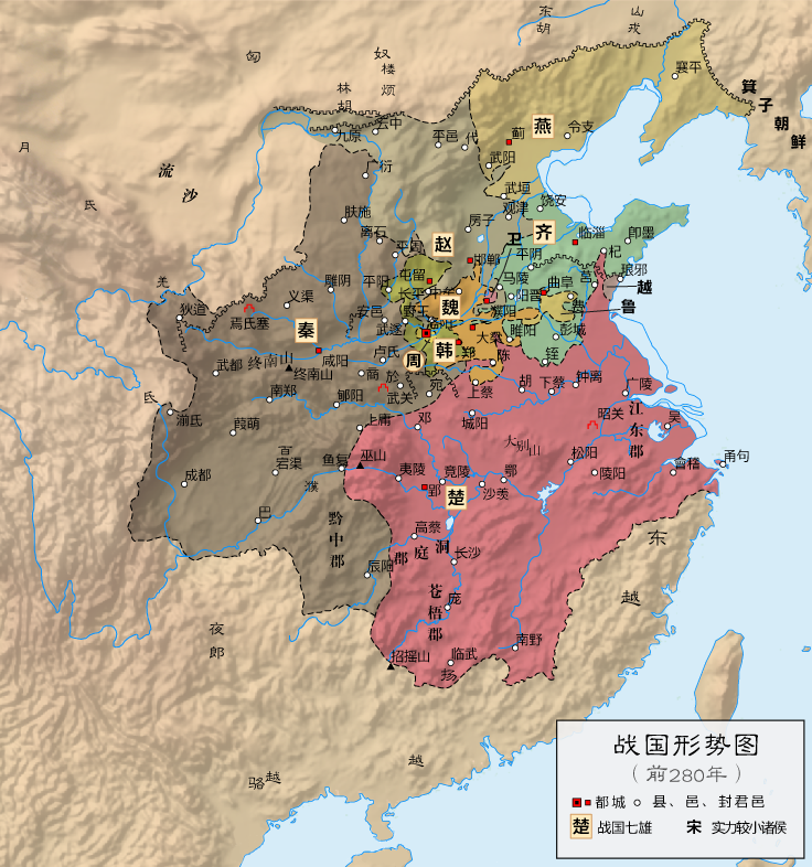 战国